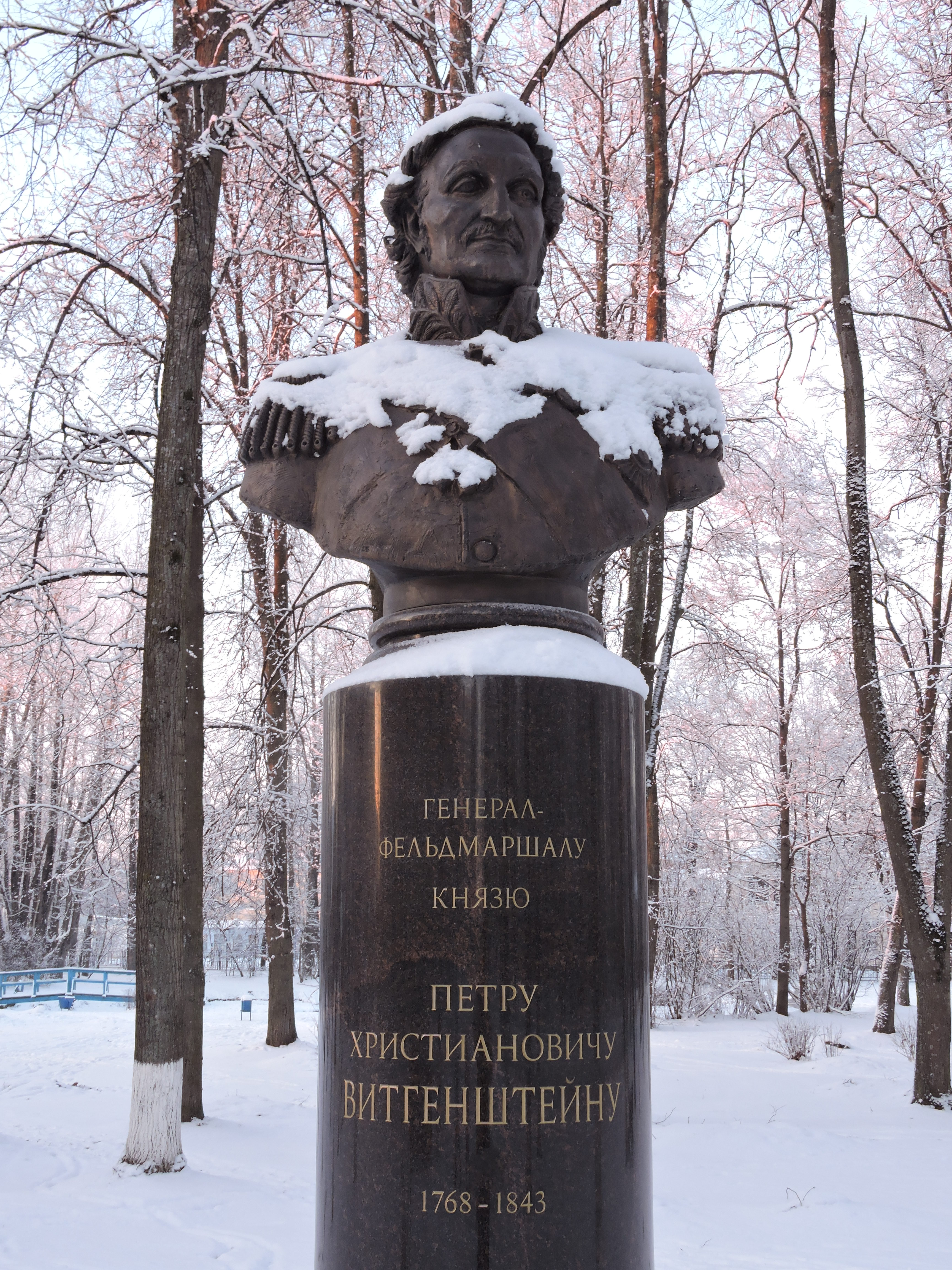 Памятник П.Х.Витгенштейну в г. Печоры Псковской области